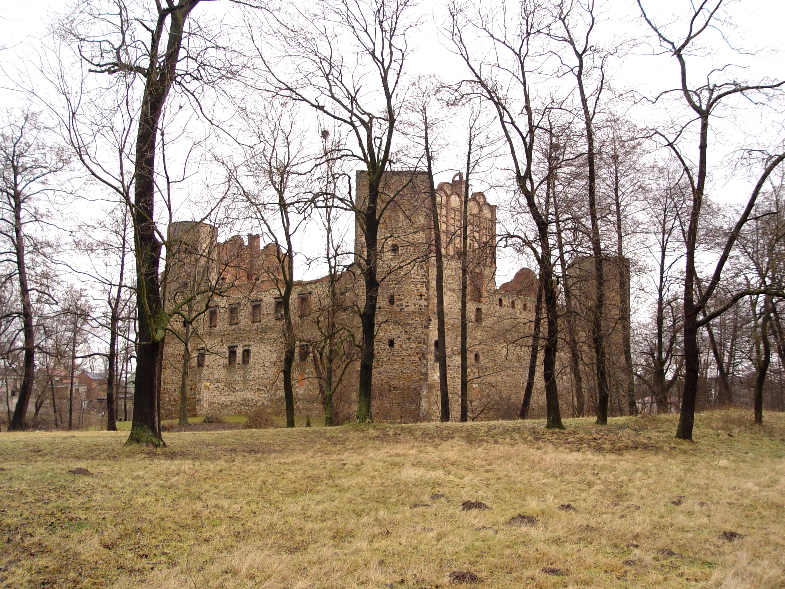 Zamek w Drzewicy,nad rzeką Drzewiczką, widok od południowo zachodniej, od strony do Końskich